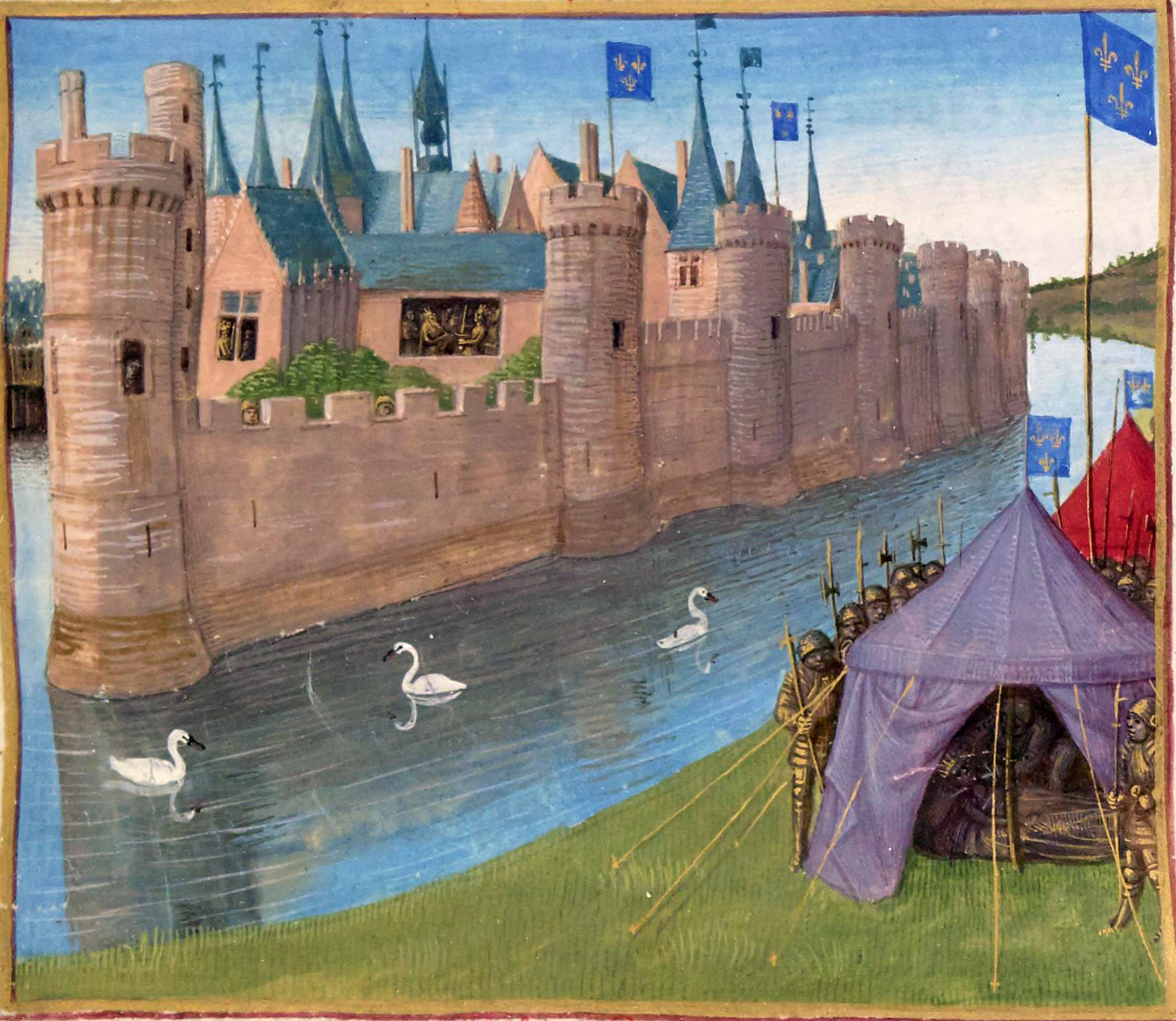 Partage du royaume de Clotaire Ier entre ses quatre fils. Assassinat de Sigebert Ier Grandes Chroniques de France, enluminées par Jean Fouquet, Tours, vers 1455-1460 Paris, BnF, département des Manuscrits, Français 6465, fol. 25 (Troisième Livre) Partage du royaume de Clotaire Ier entre ses quatre fils : Voulant usurper le pouvoir au détriment de ses frères, Chilpéric s'empare du trésor de son père et s'assure le soutien des grands du royaume. Ses frères, Sigebert, Gontran et Charibert, le surprennent à Paris et font valoir leurs droits. La scène se situe dans l'île de la Cité. Assassinat de Sigebert Ier (au premier plan) : Lors du siège de Tournai, ville dans laquelle Chilpéric et sa famille se sont réfugiés, un émissaire de Frédégonde transperce la gorge de Sigebert allongé sous sa tente.